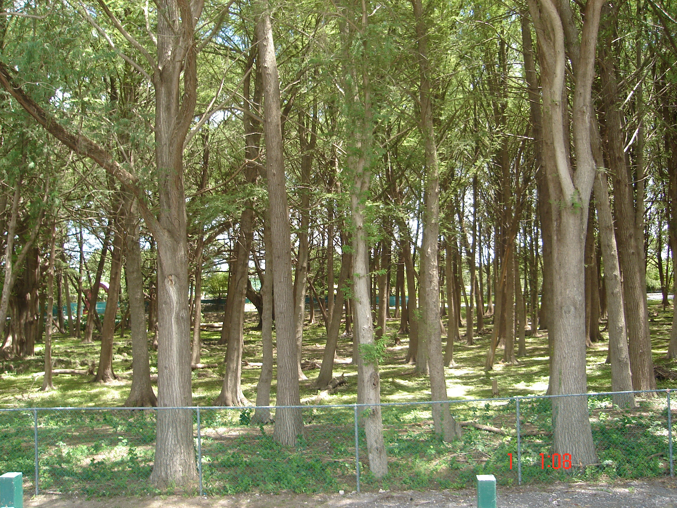 Sabinales en el parque nacional "El sabinal